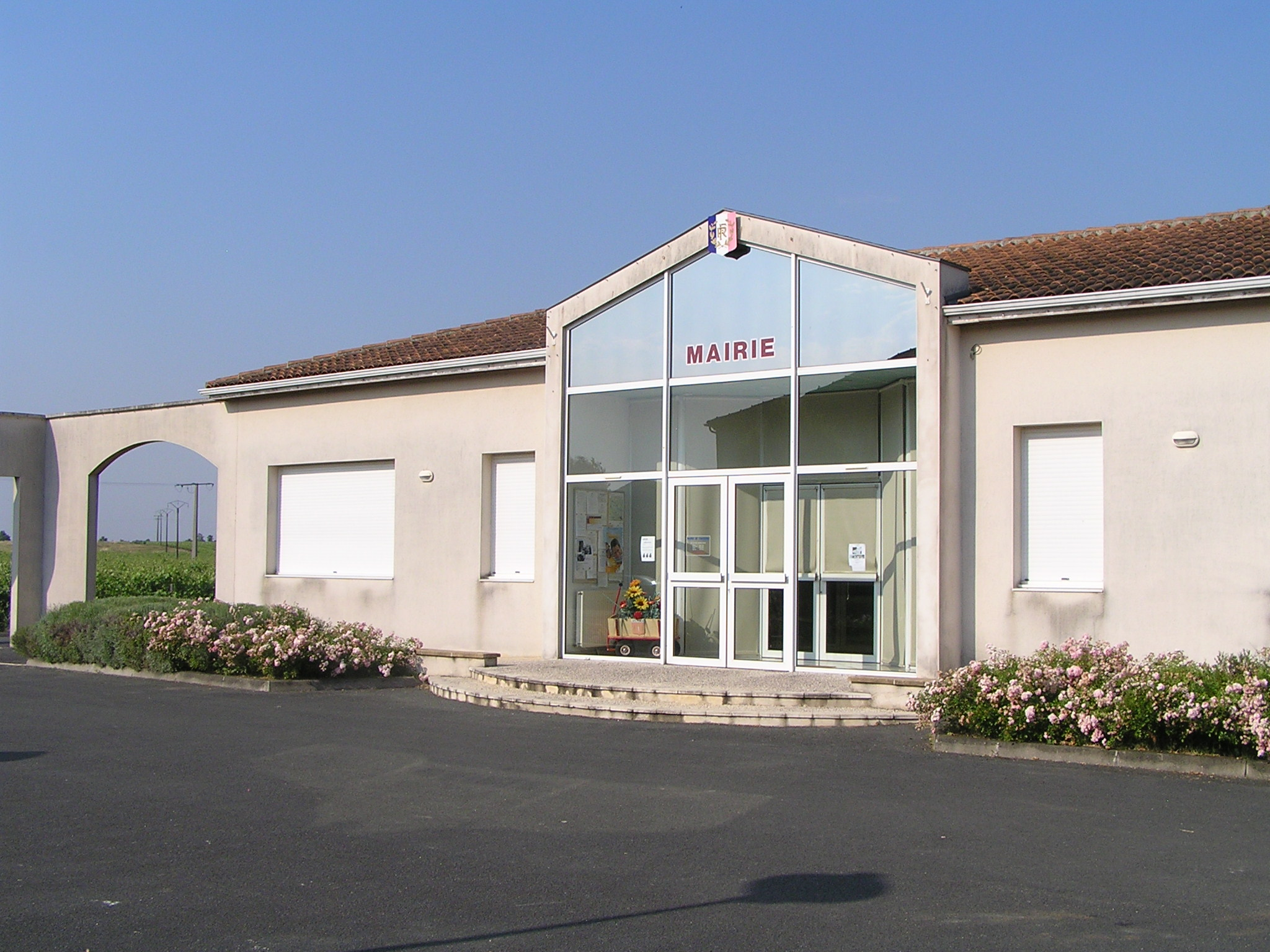 mairie de Chassors